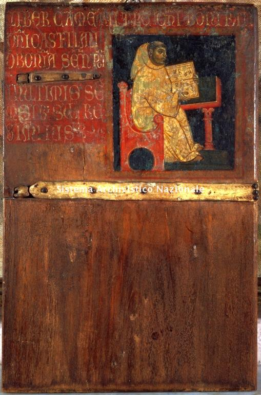 Archivio di Stato di SIENA. Collezione delle Tavolette di Biccherna. Inv. n. 1 Gilio di Pietro, "Don Ugo, monaco di San Galgano, camerlengo"